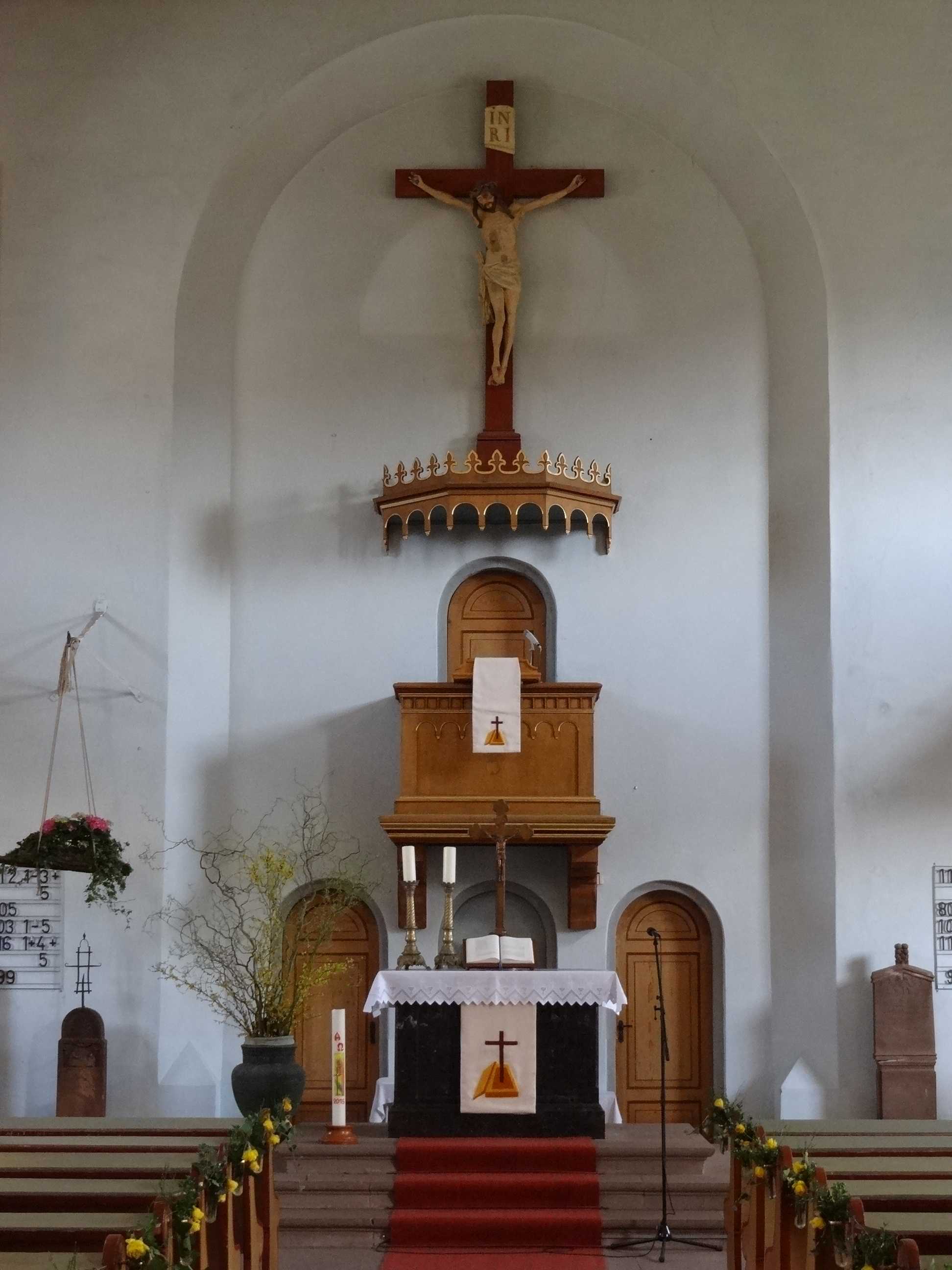 Evangelische Kirche Beuern